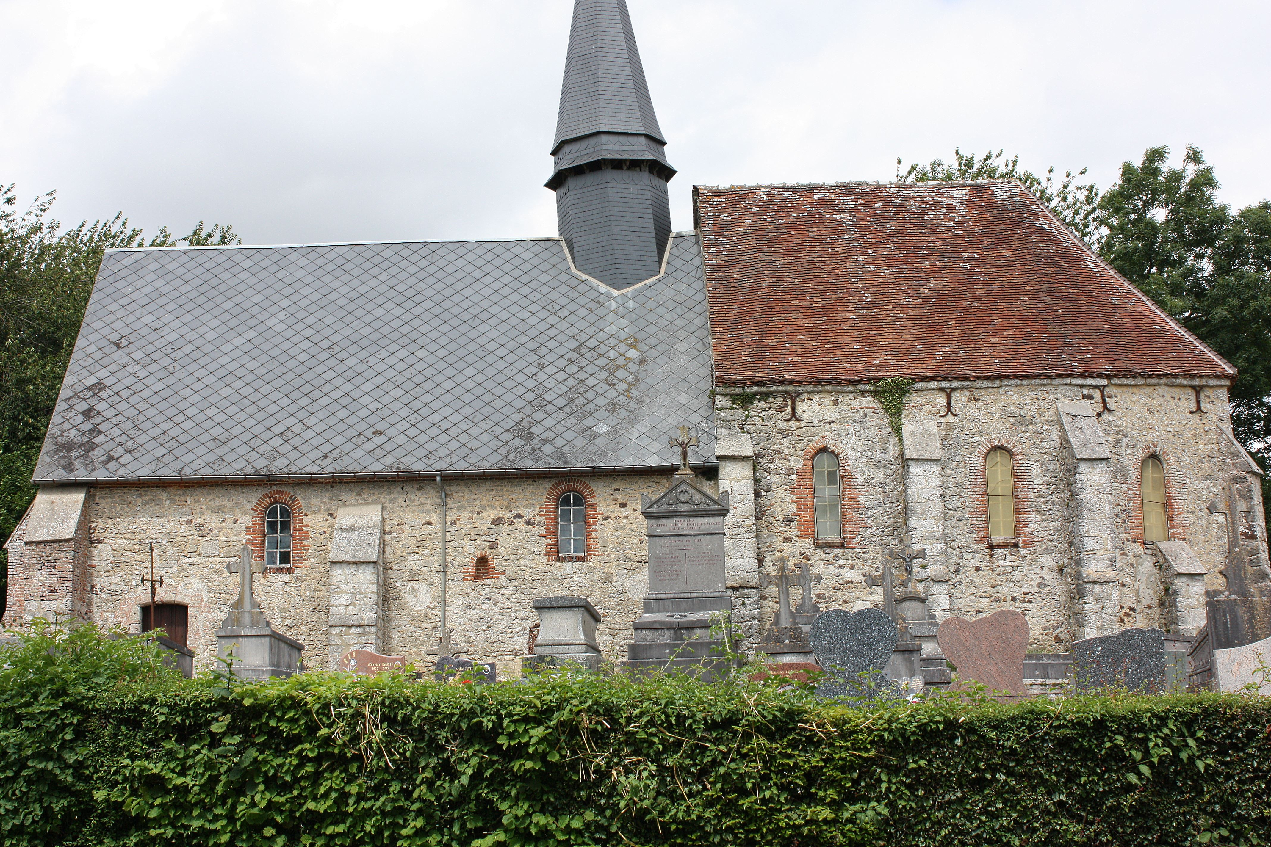 Chapelle de Saint-Pierre-mi-les-Camps